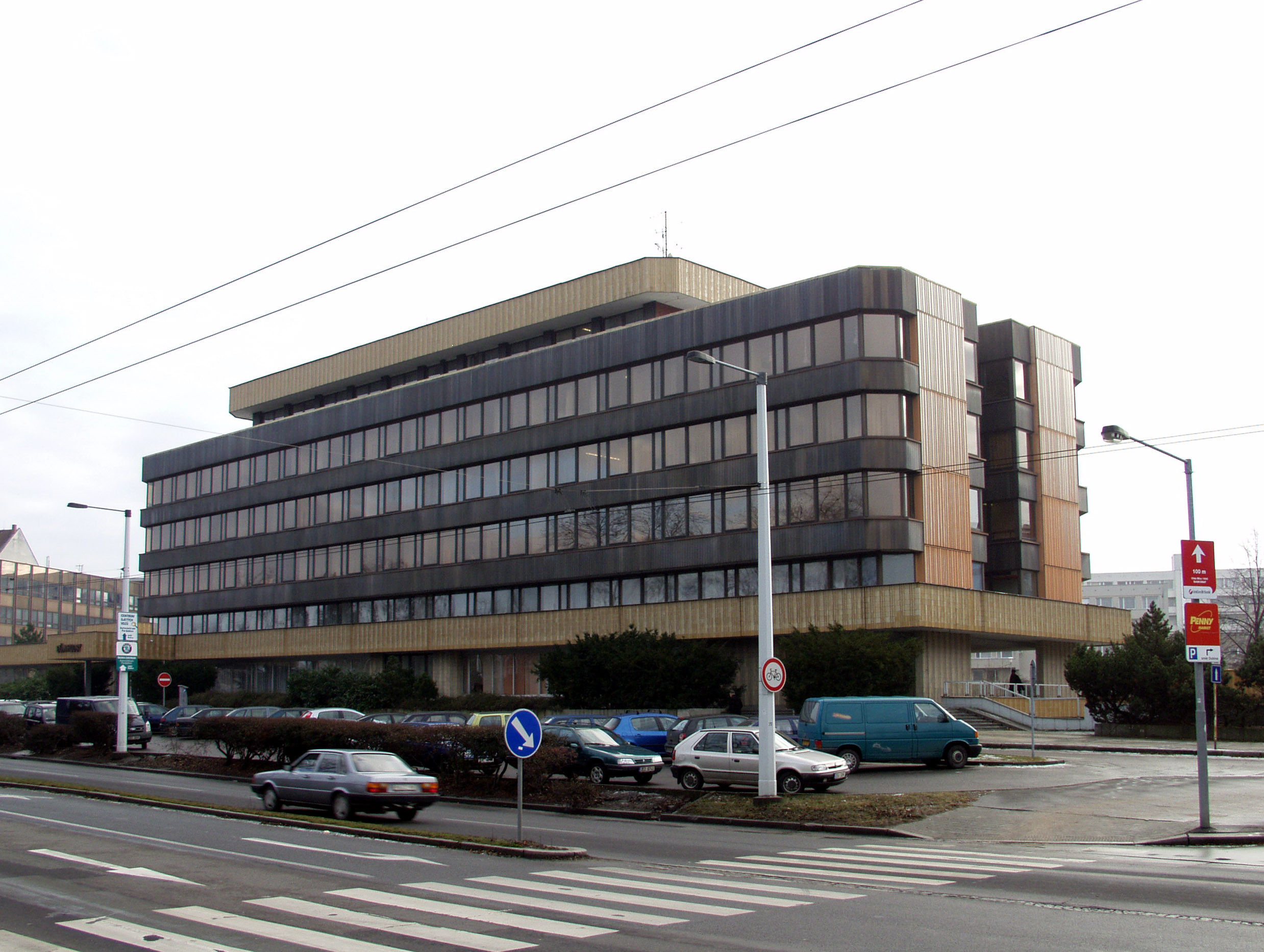 Pardubice-Zelené Předměstí, Dům hudby a Konzervatoř Pardubice, Sukova 1260, stavěný jako sídlo KSČ v Pardubicích